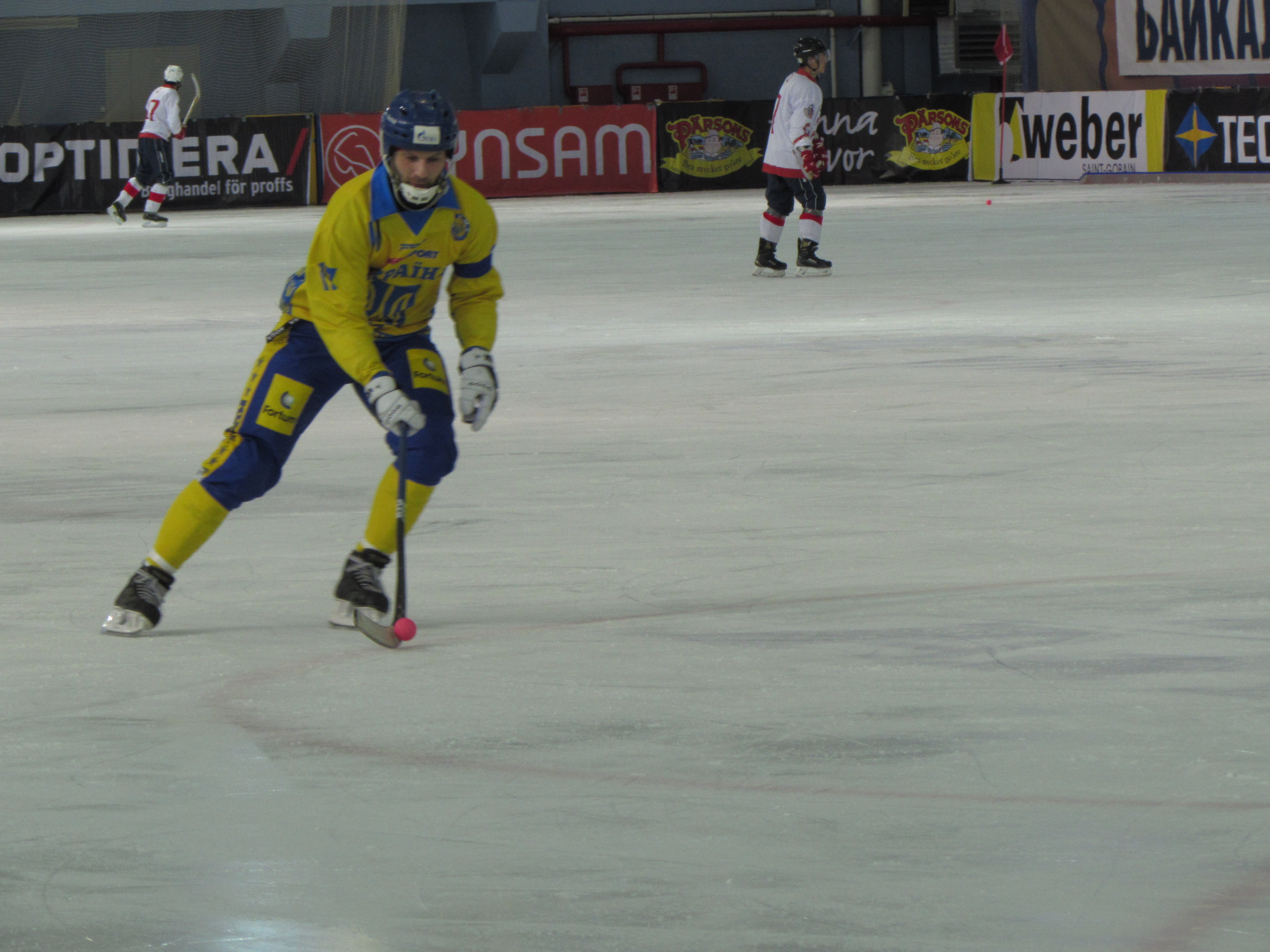 Марковиченко